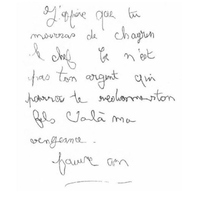 Lettre par laquelle le corbeau dans affaire de l'assassinat du petit Grégory revendique son crime. Il annonce ainsi : – "J'espère que tu mourras de chagrin le chef Ce n'est pas ton argent qui pourras te redonner ton fils Voilà ma vengeance. pauvre con".